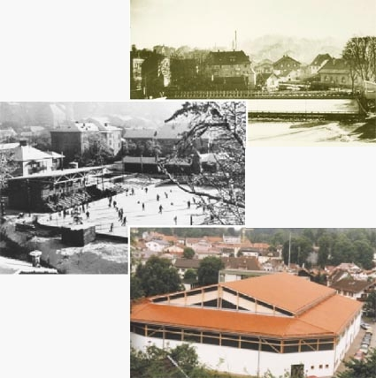 Station des TEV Miesbach